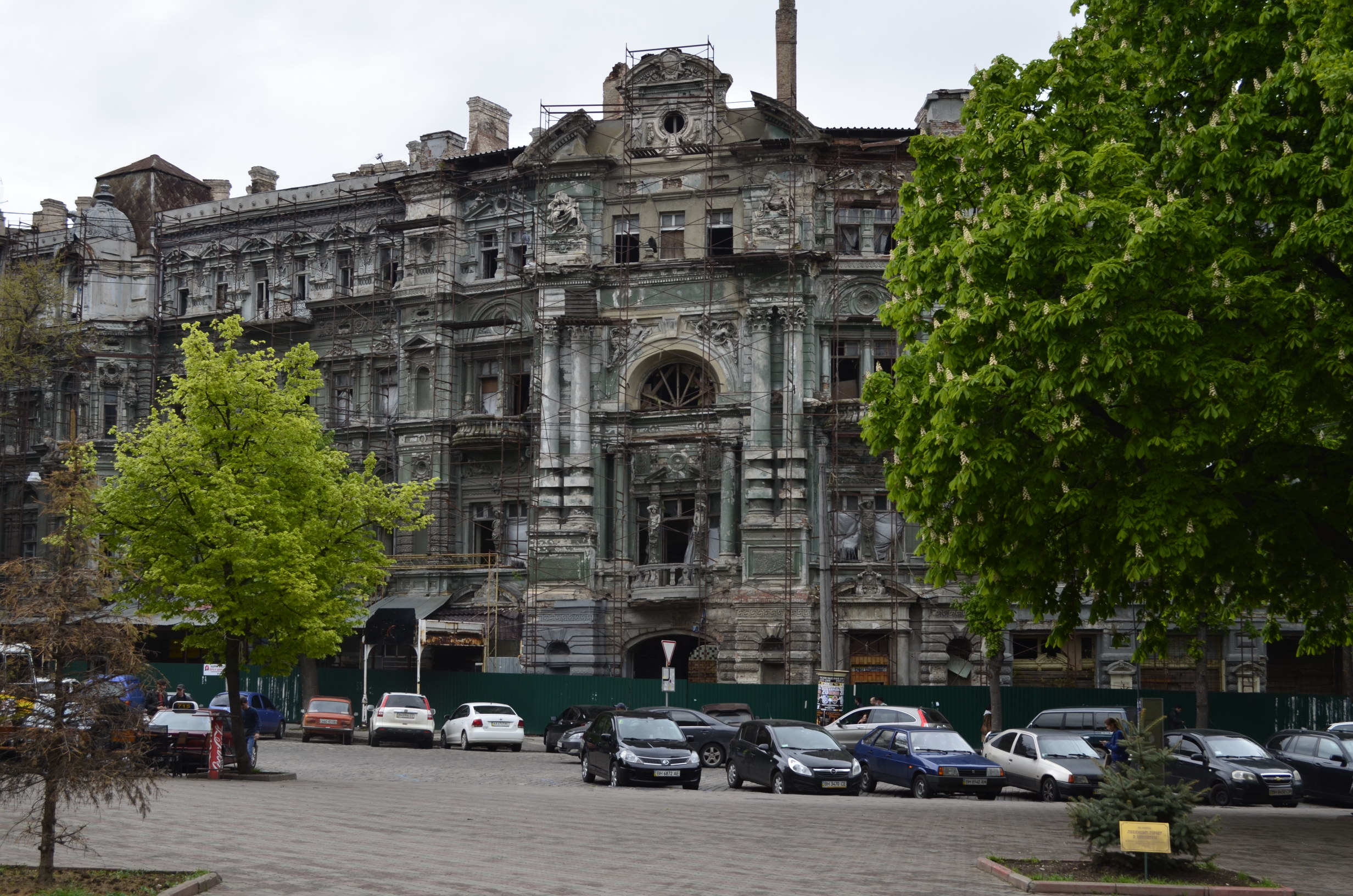 Одеса, 26 квітня 2016 року